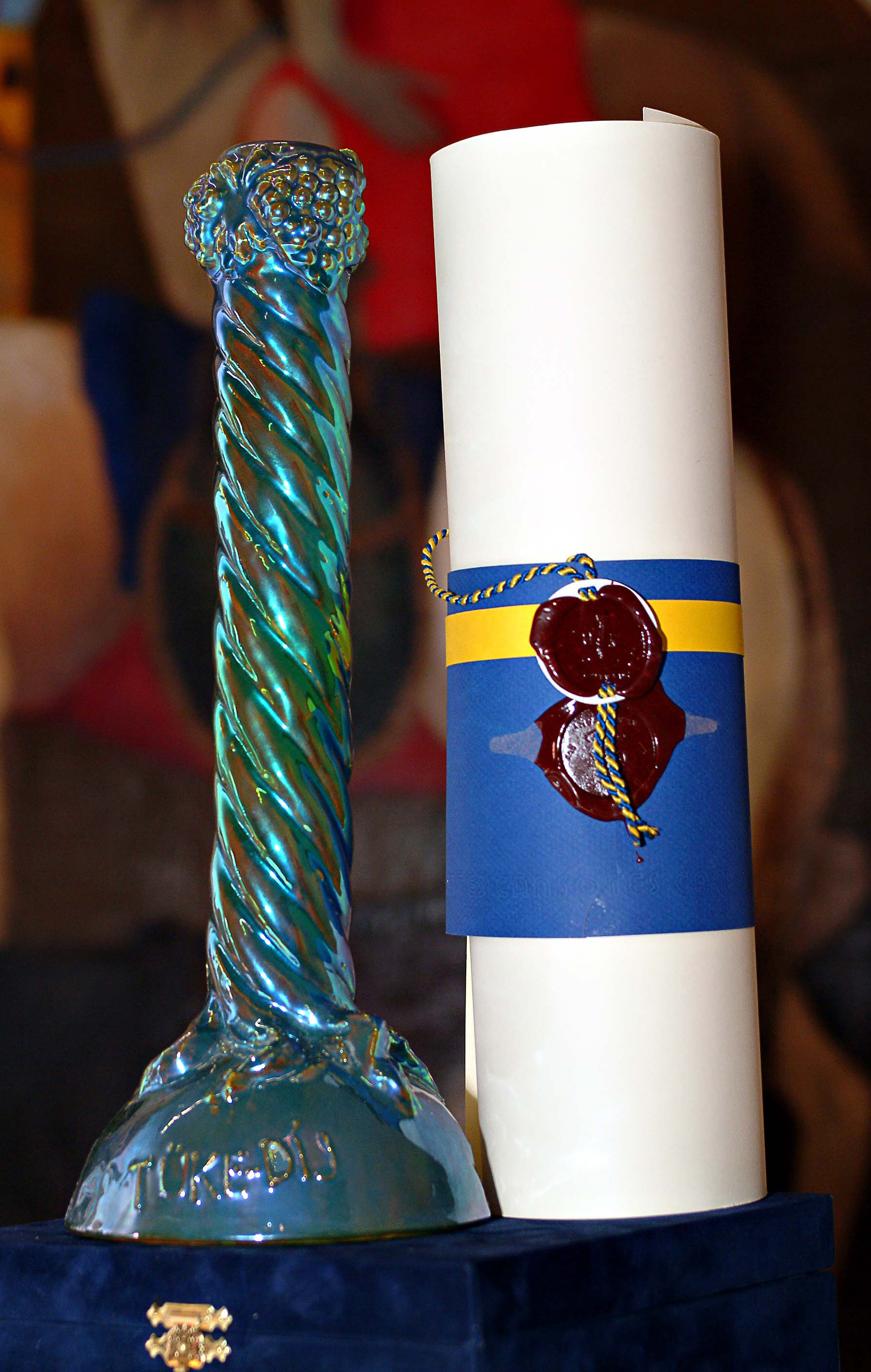 Tüke-díj és oklevél